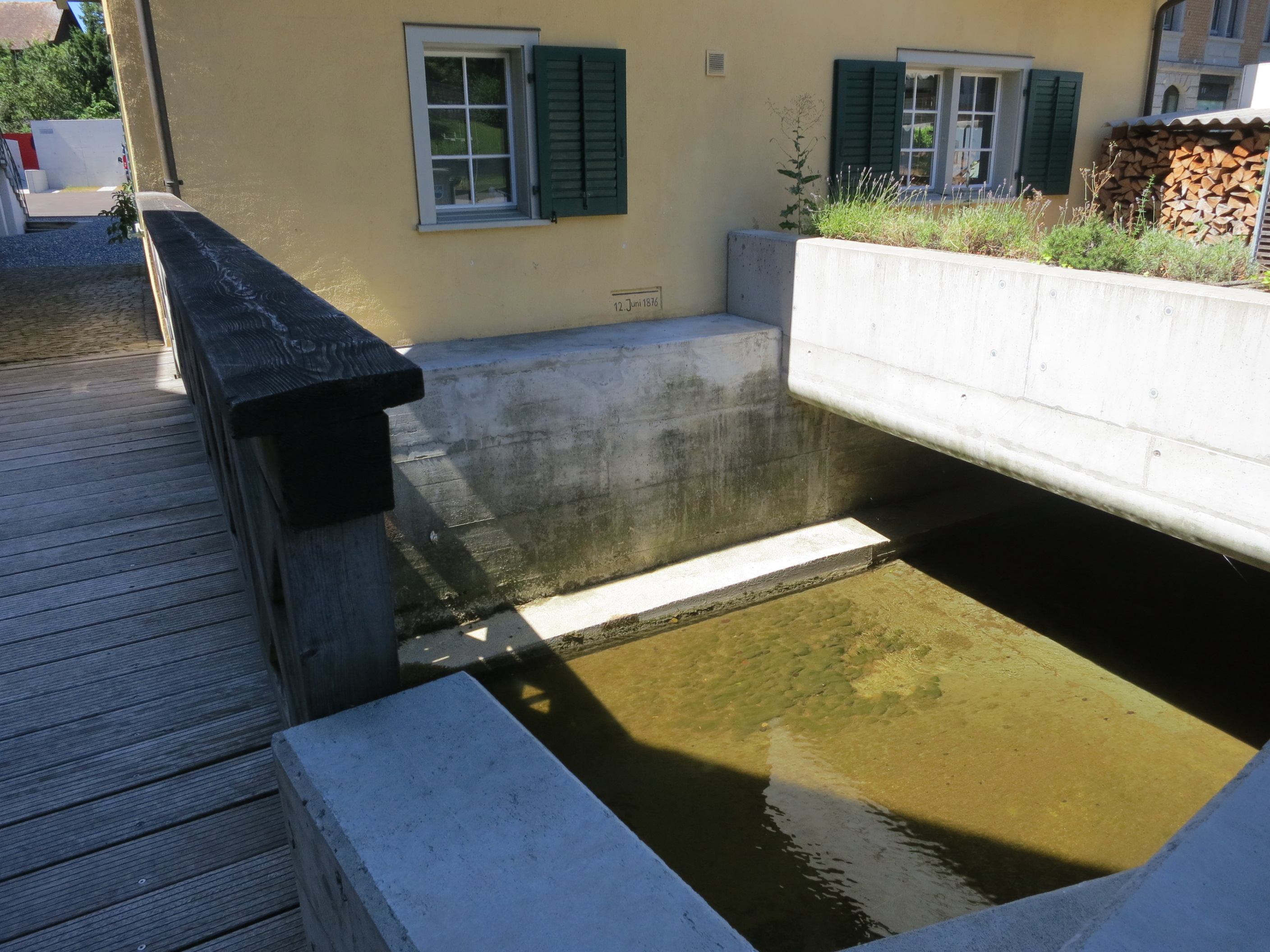 Hochwassermarke 1876, Jonenbach, Affoltern am Albis ZH, Schweiz